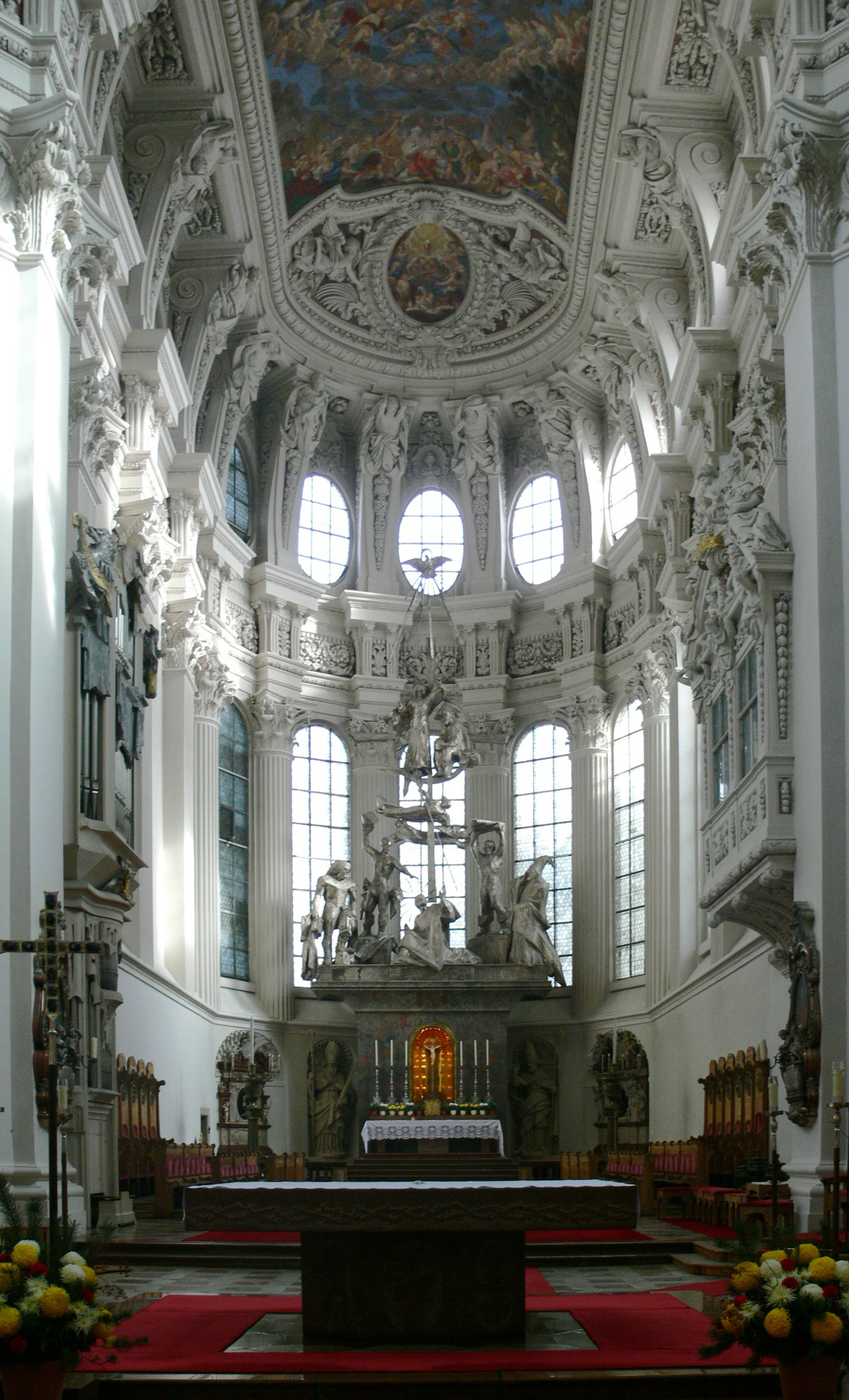 Passau, Dom St. Stephan Blick in den Chor